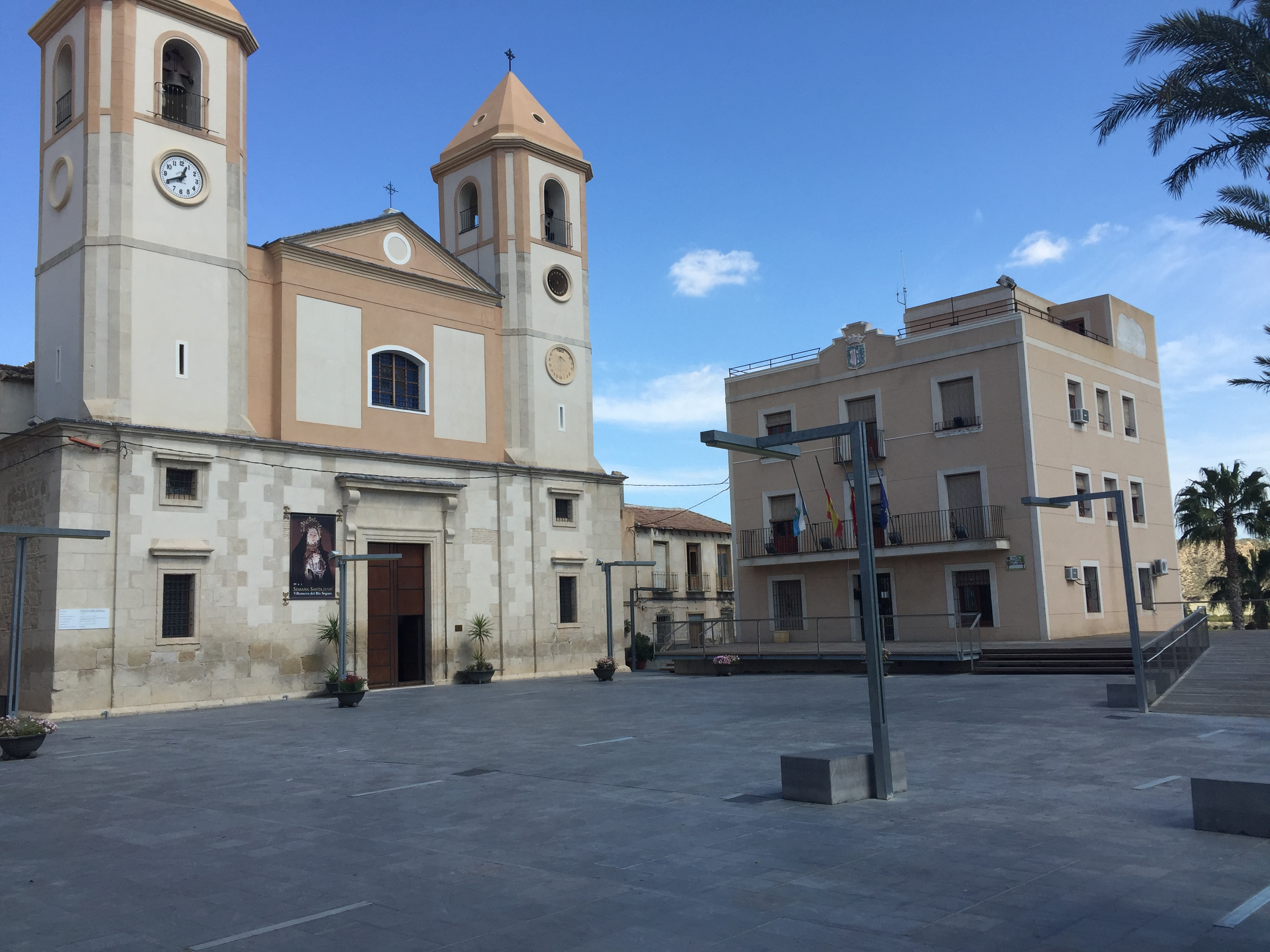 Plaza constitucion villanueva del rio segura